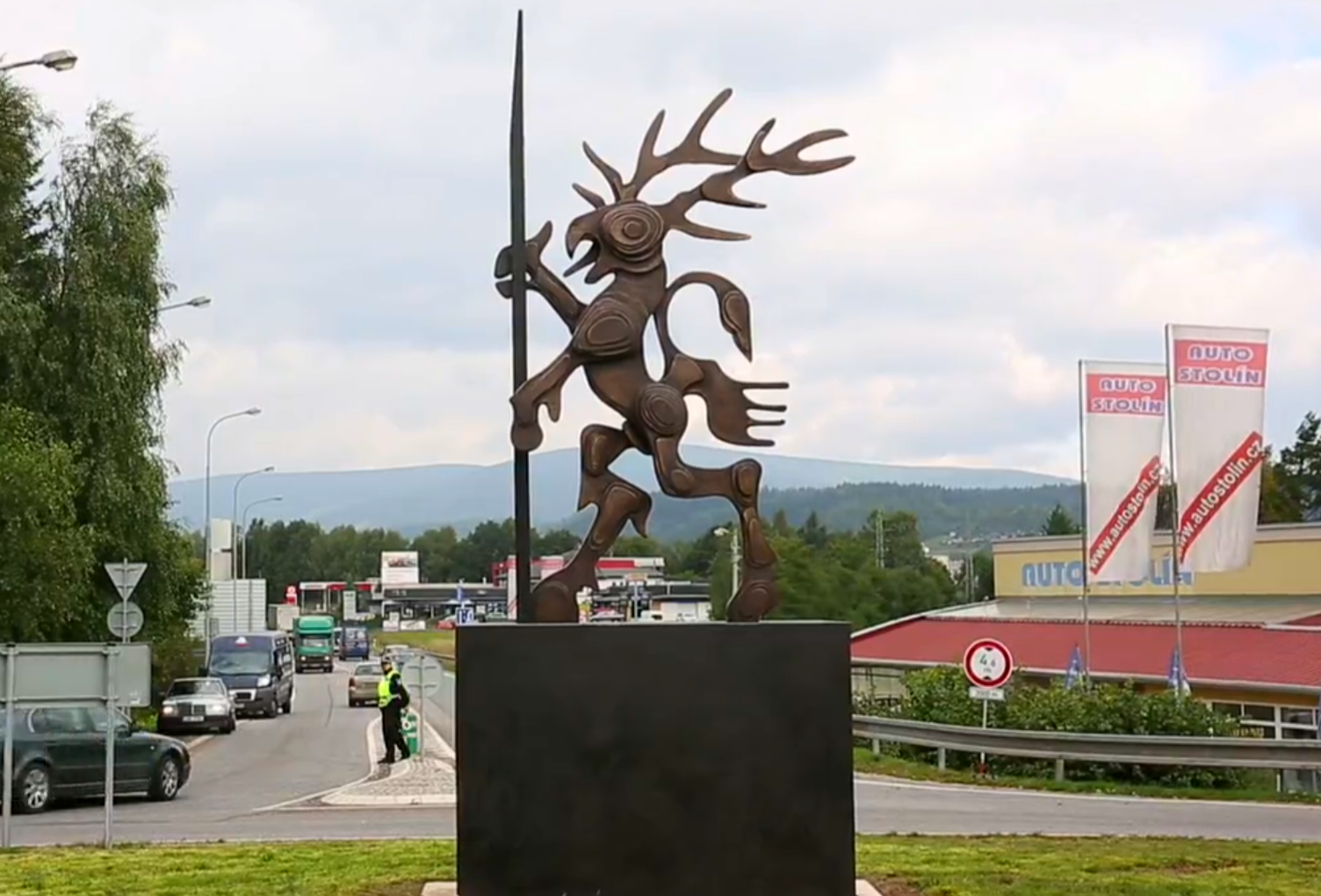 Jedno ze zobrazení Rýbrcoula odhaleného 18. 9. 2013 na kruhovém objezdu v Trutnově na Krkonošské ulici. Autorka sochy Paulina Skavová